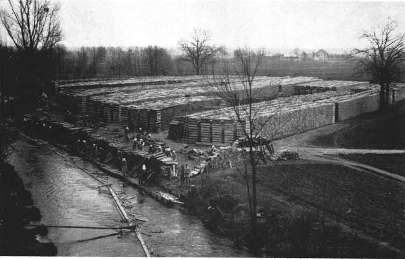 Scheiterschwemme auf der Naarn, Perger Holzplatz